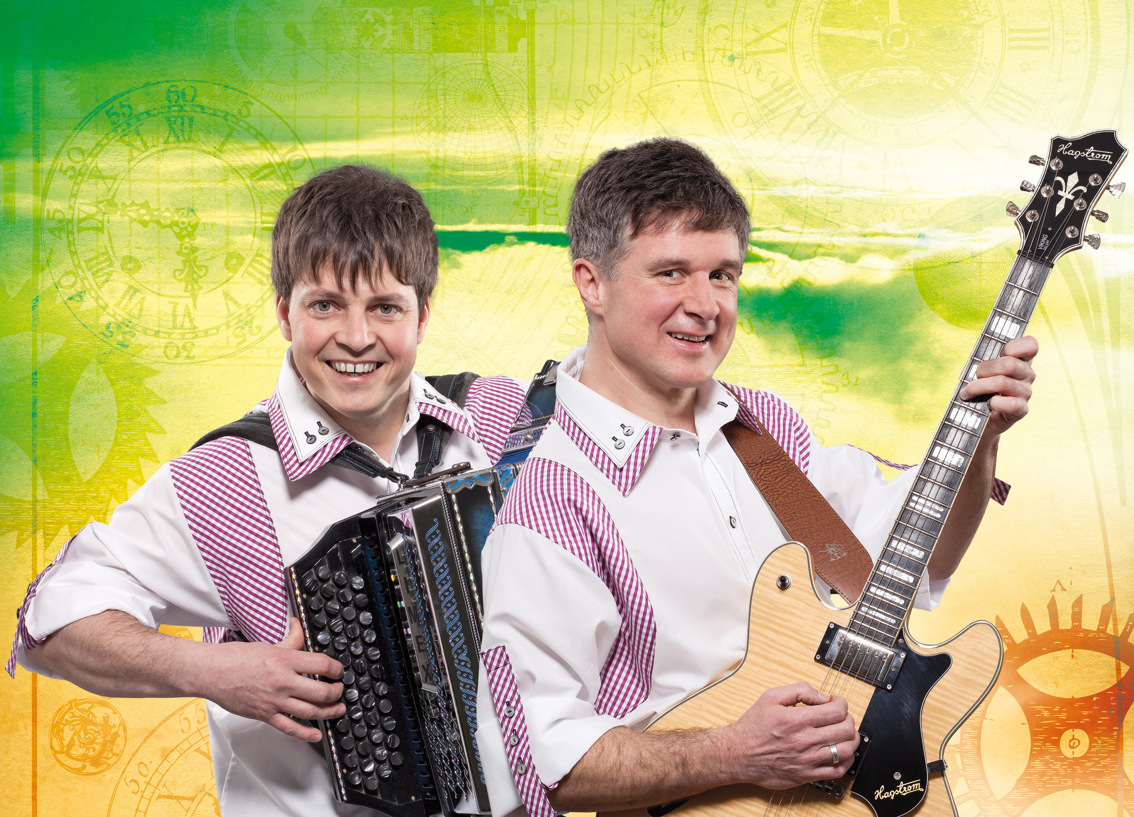 De Hutzenbossen